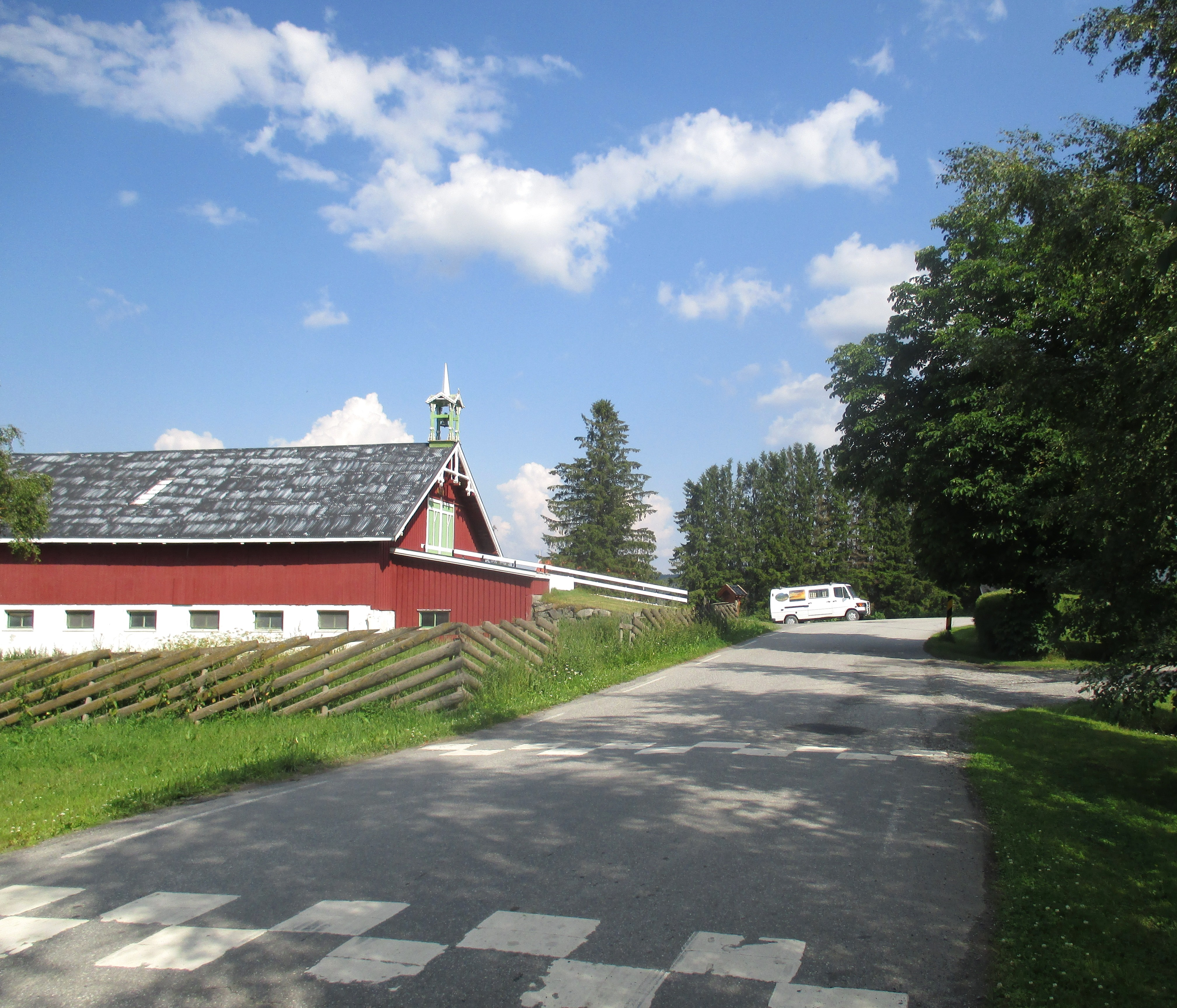 Fylkesvei 2344 (tidl. 79) ved Dyste i Østre Toten